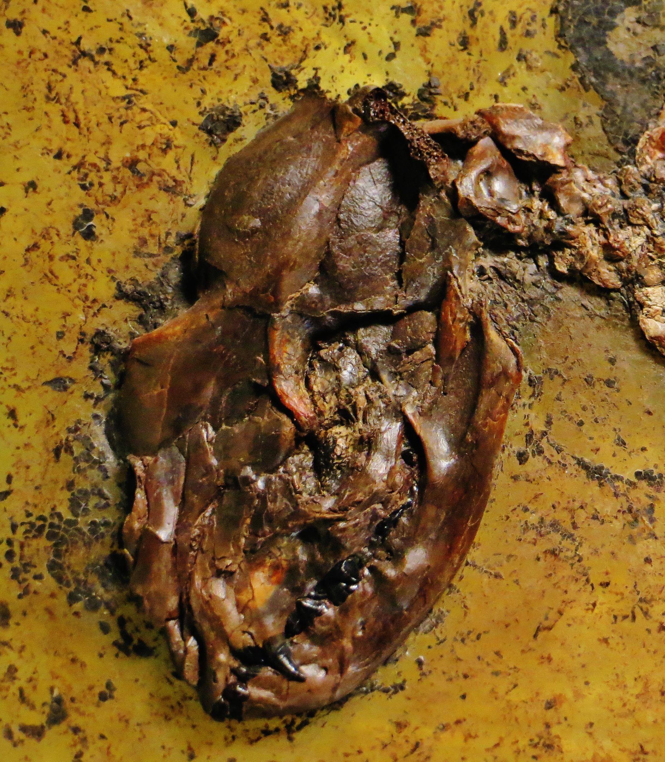 Took the picture at Senckenberg Museum, Frankfurt